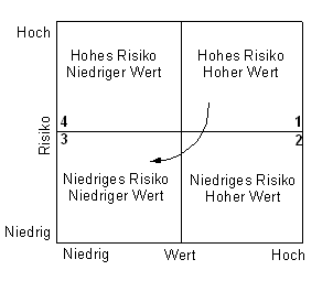 Risk-Value Priorisierung